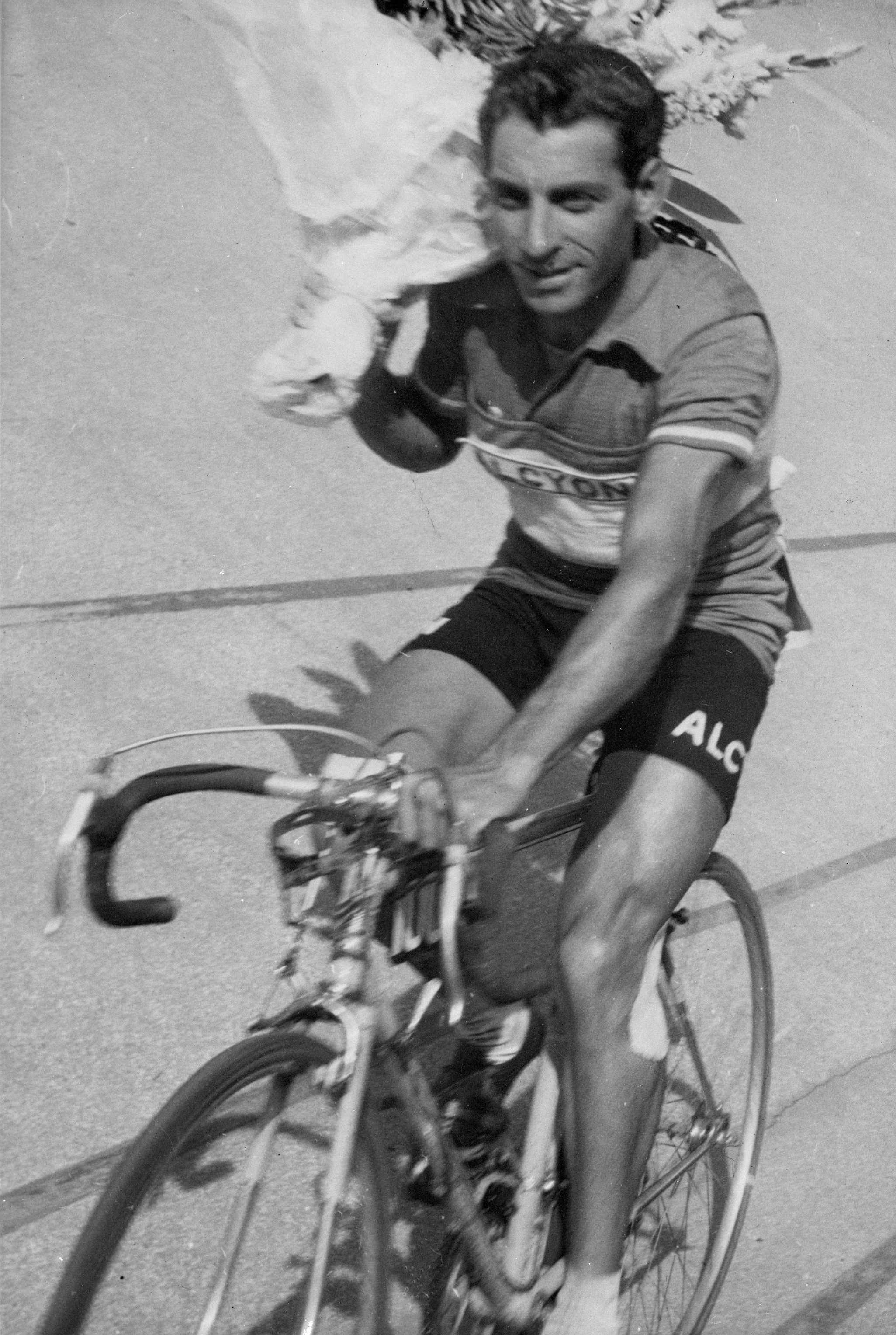 Photo originale détenue par Vincent Vitetta -offerte par l'auteur